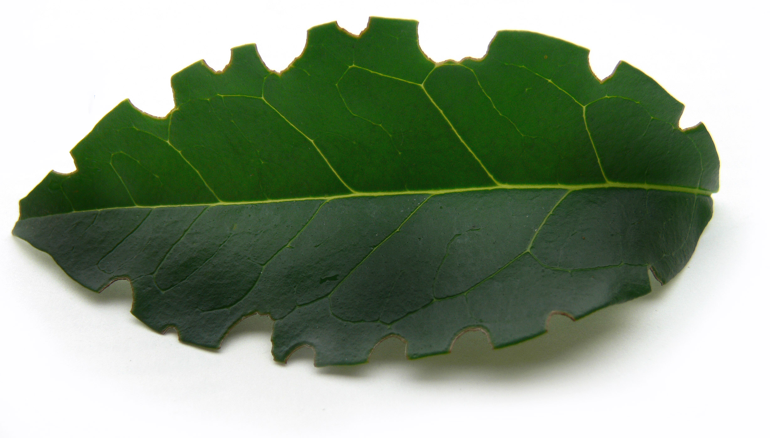 feuille de Troène découpée par des abeilles solitaires (Mégachile), bordure du Bois de la Citadelle, Lille, Région Nord-Pas-de-Calais, nord de la France. Des milliers de feuilles sont ainsi découpées, sans que les buissons n'en semblent affectés.